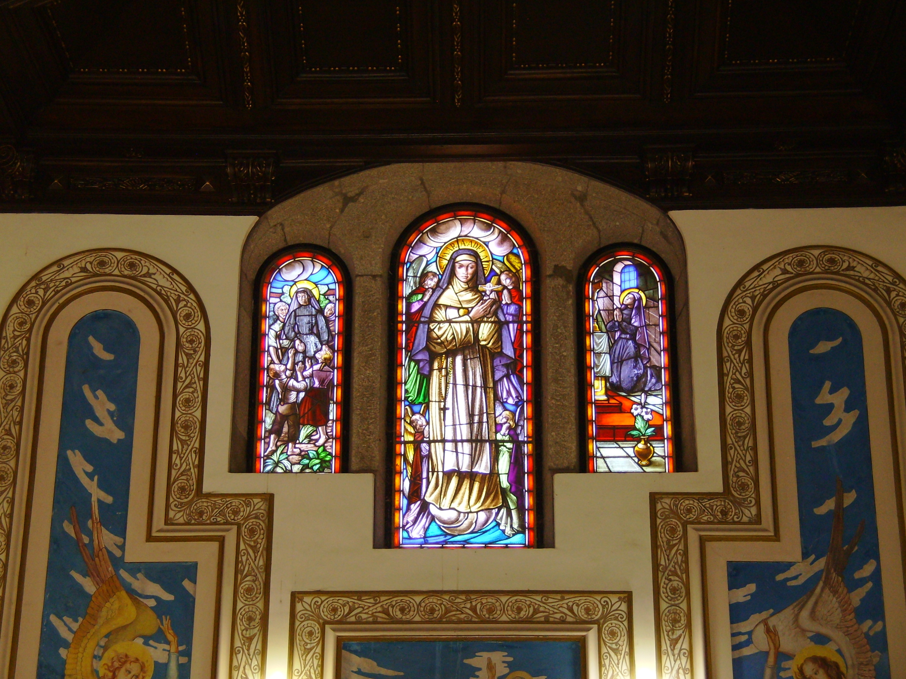 Capela-jazigo de D. Maria Adelaide de Sam José e Sousa, também referida como Santa Maria Adelaide e Santinha de Arcozelo, Arcozelo, Vila Nova de Gaia, distrito do Porto, Portugal: detalhe do vitral.